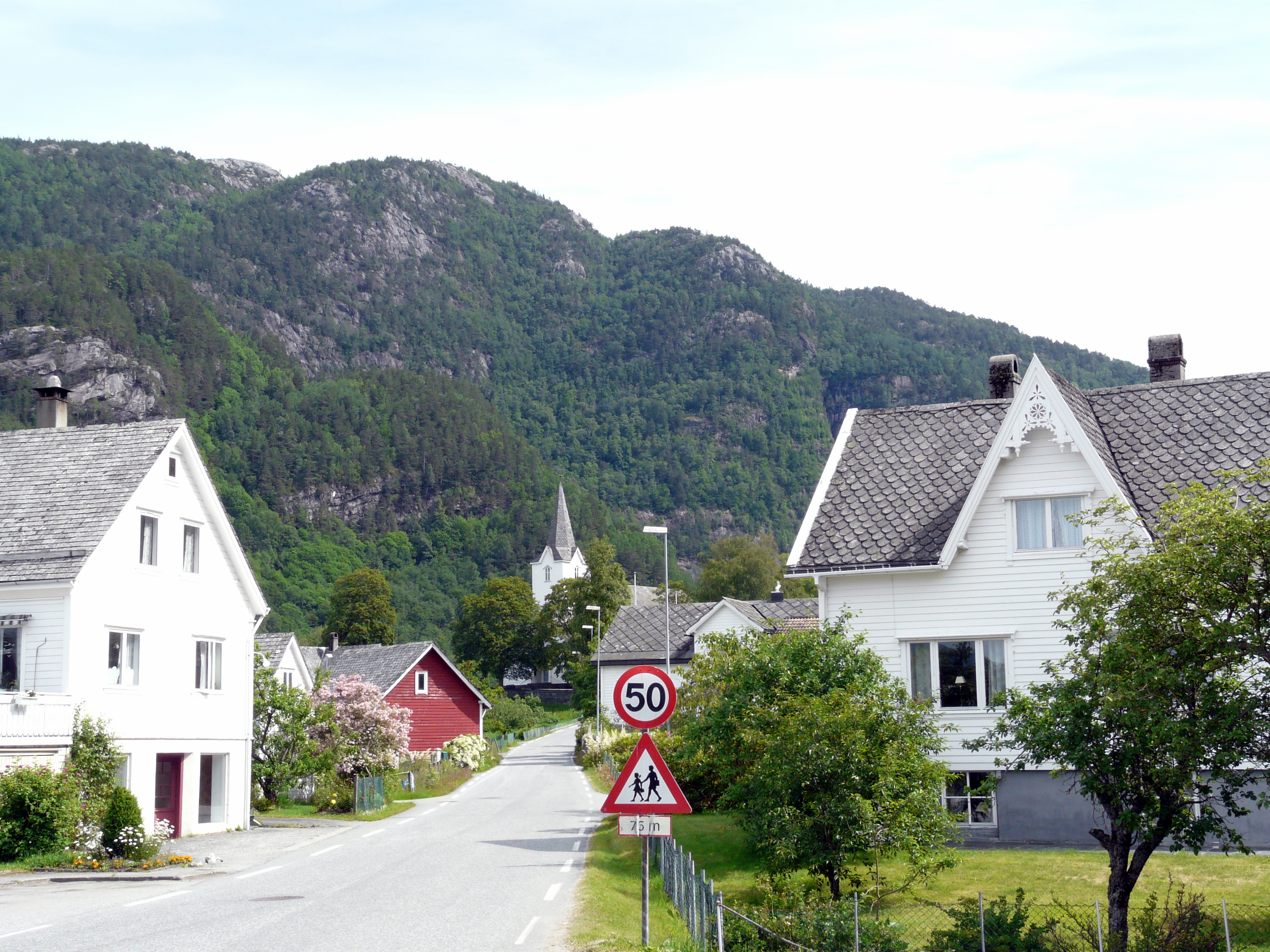 Jondal